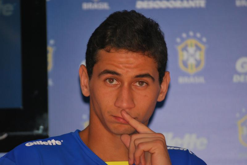 Jogador Ganso em 2010.